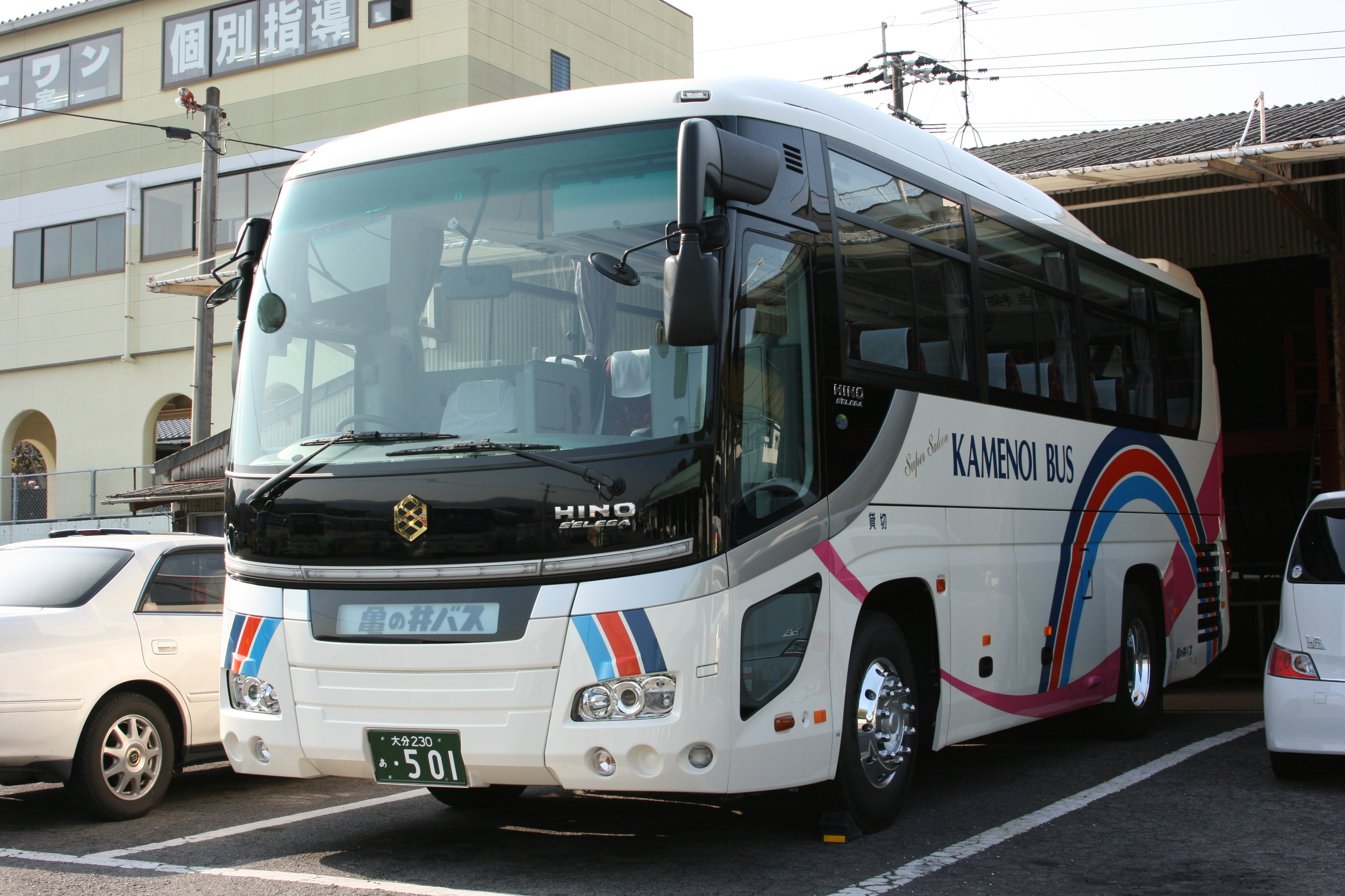 亀の井バス貸切バス(新塗装)日野セレガショート(BDG-RU8JHAA)亀の井バス本社にて許可を得て撮影